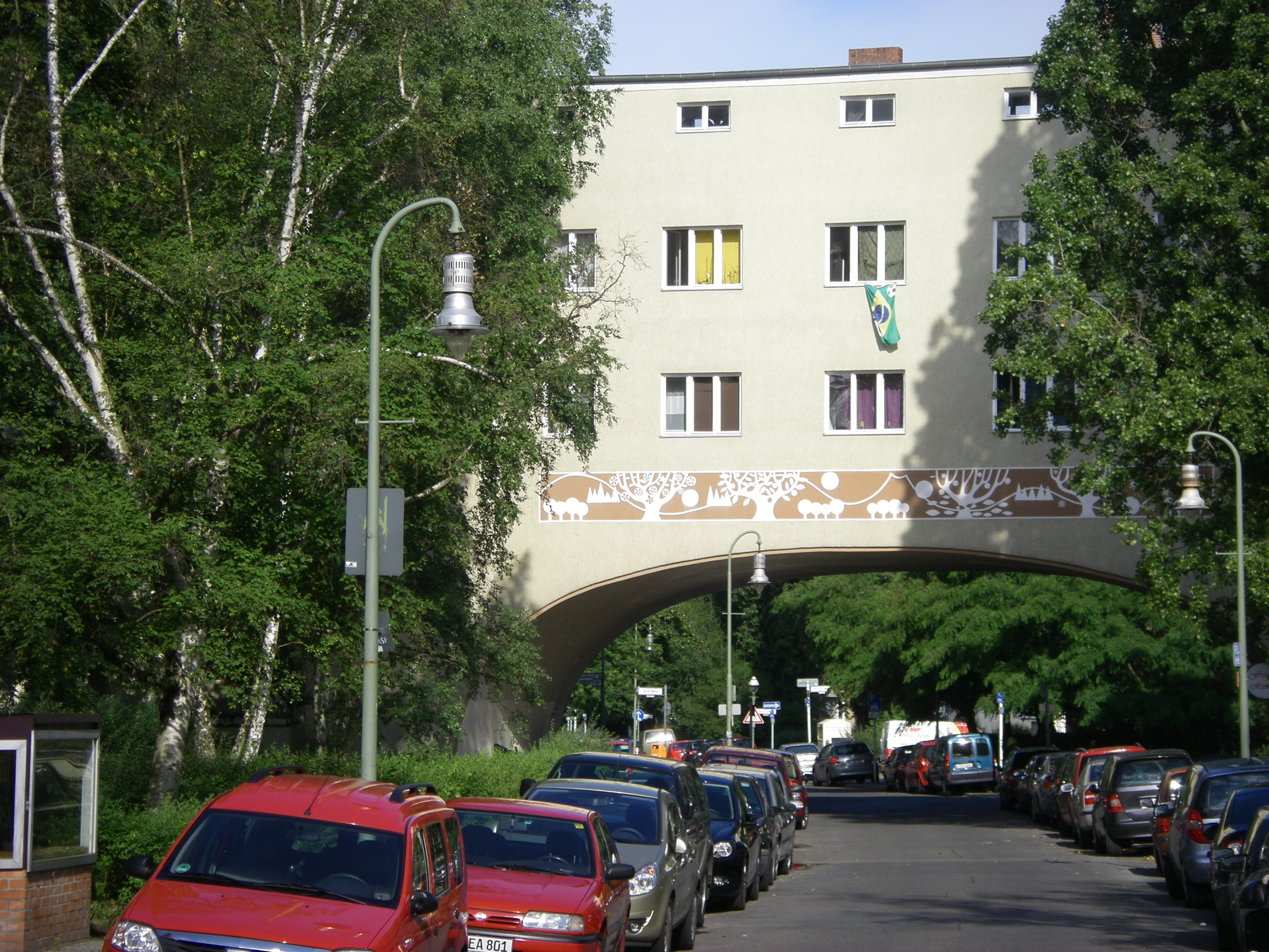 Berlin-Siemensstadt Goebelstraße